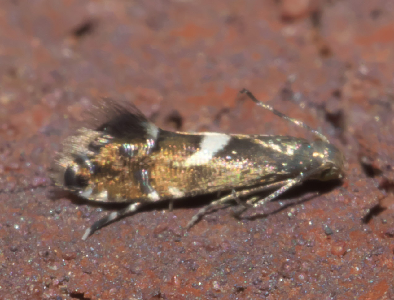 Diploschizia, Subfamily: Sedge Moths, Diploschizia impigritella or lanista, Size: 3.3 mm, ID Confidence: 88